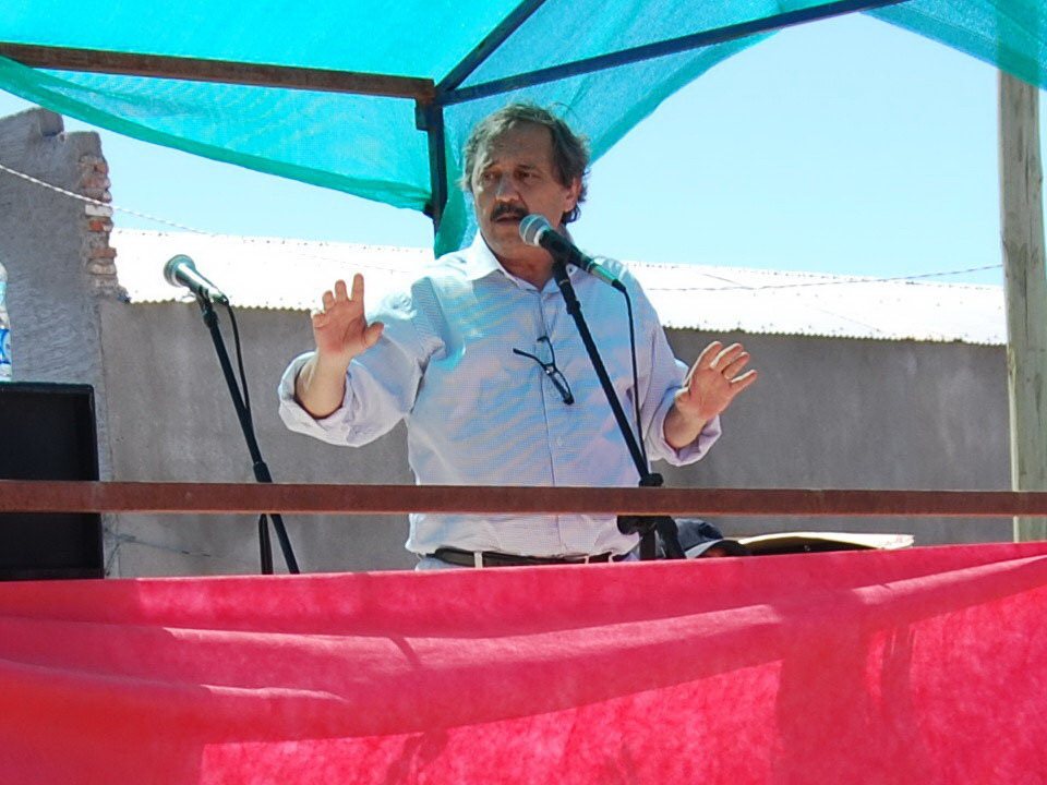 Ricardo Alfonsín da un discurso en Chubut